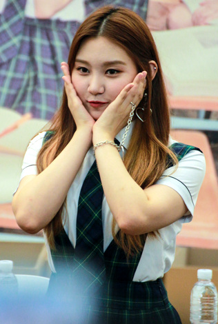 170910 프리스틴 팬싸인회